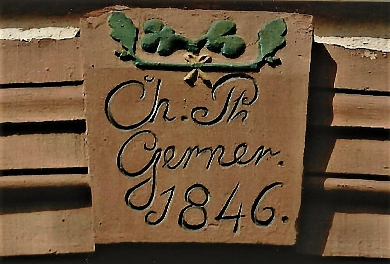 Gerner, Hausname 1846